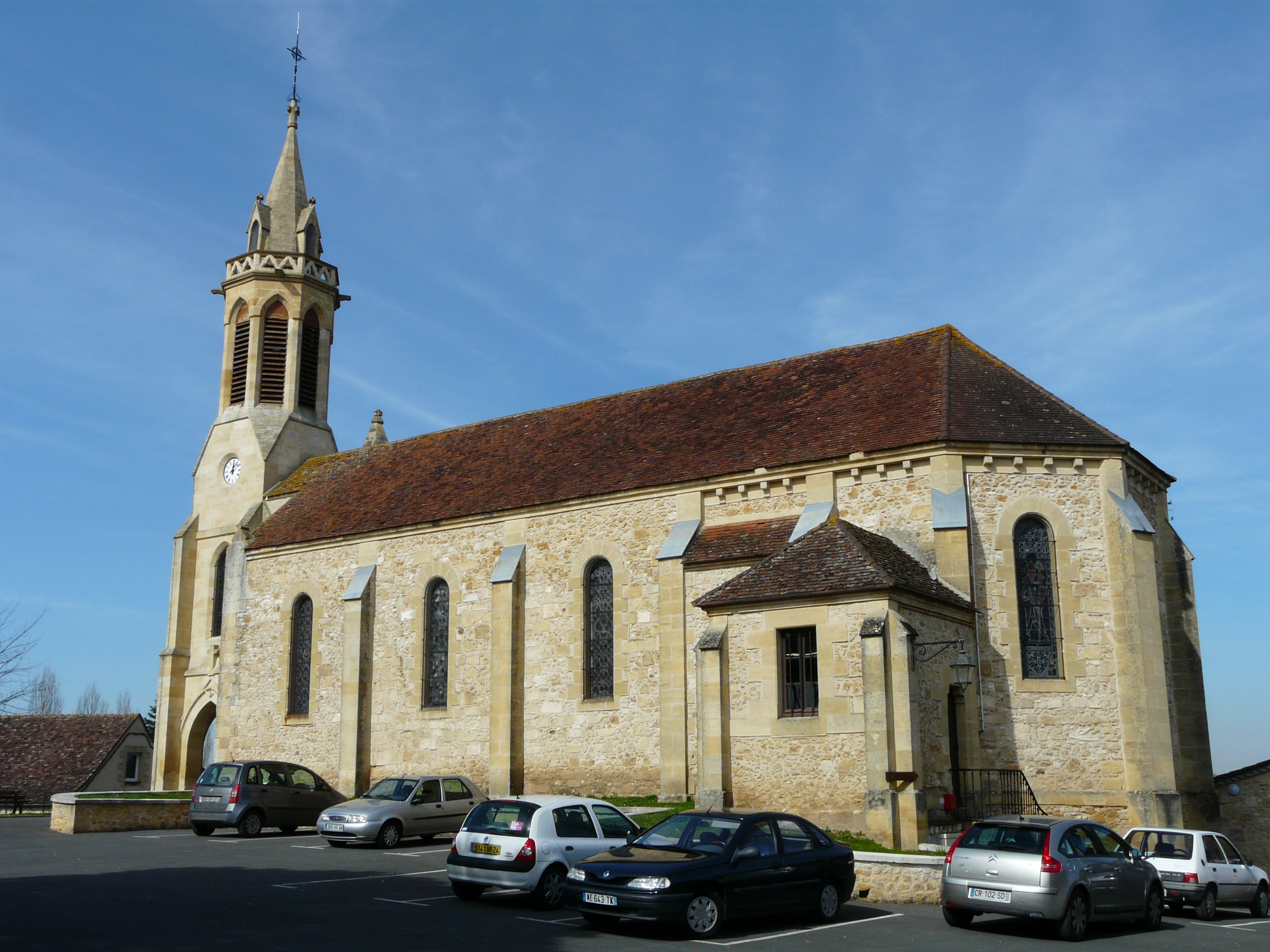 L'église de la Décollation-de-Saint-Jean-Baptiste, Cours-de-Pile, Dordogne, France.